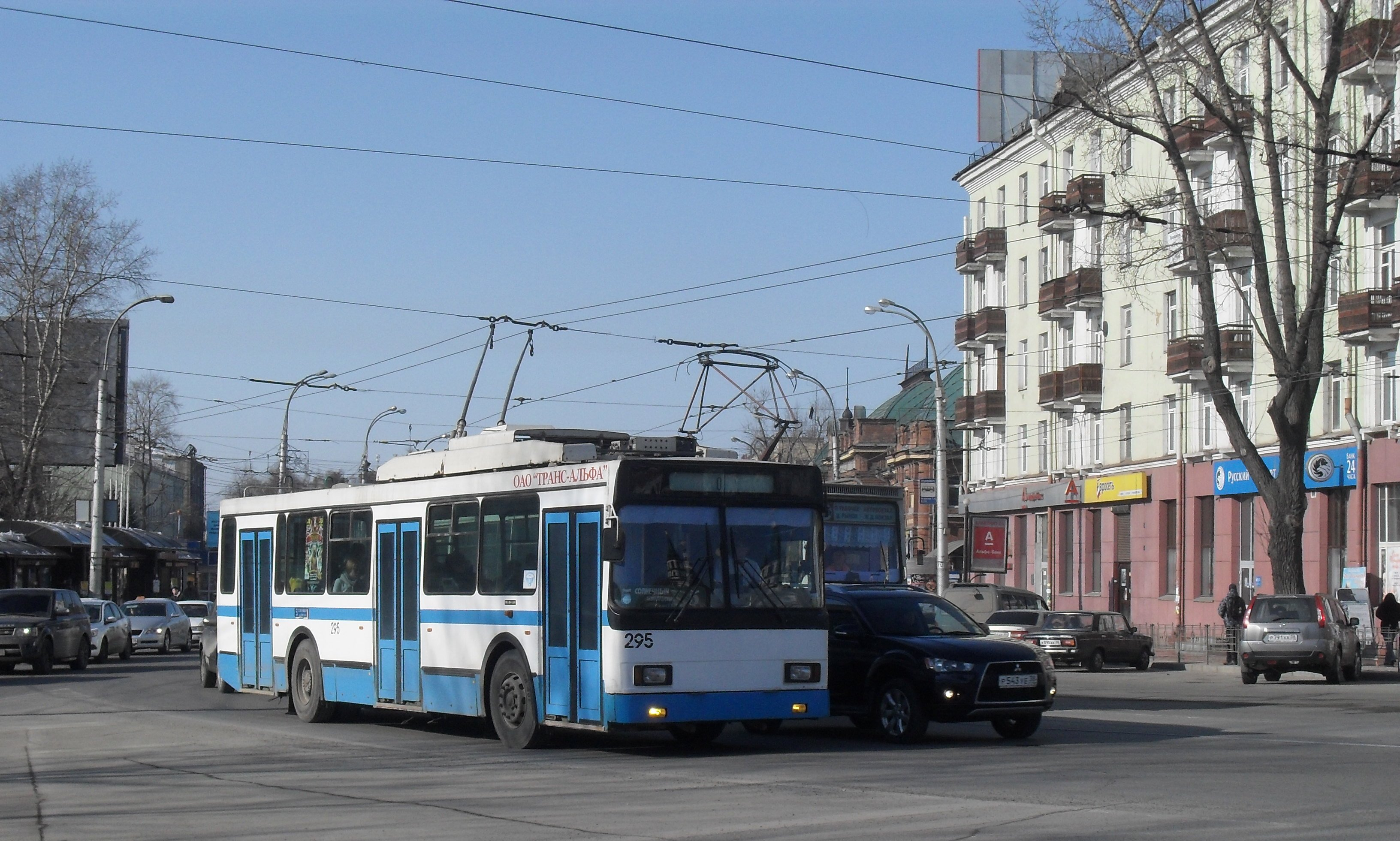 Иркутск. Улица Ленина. Троллейбус.